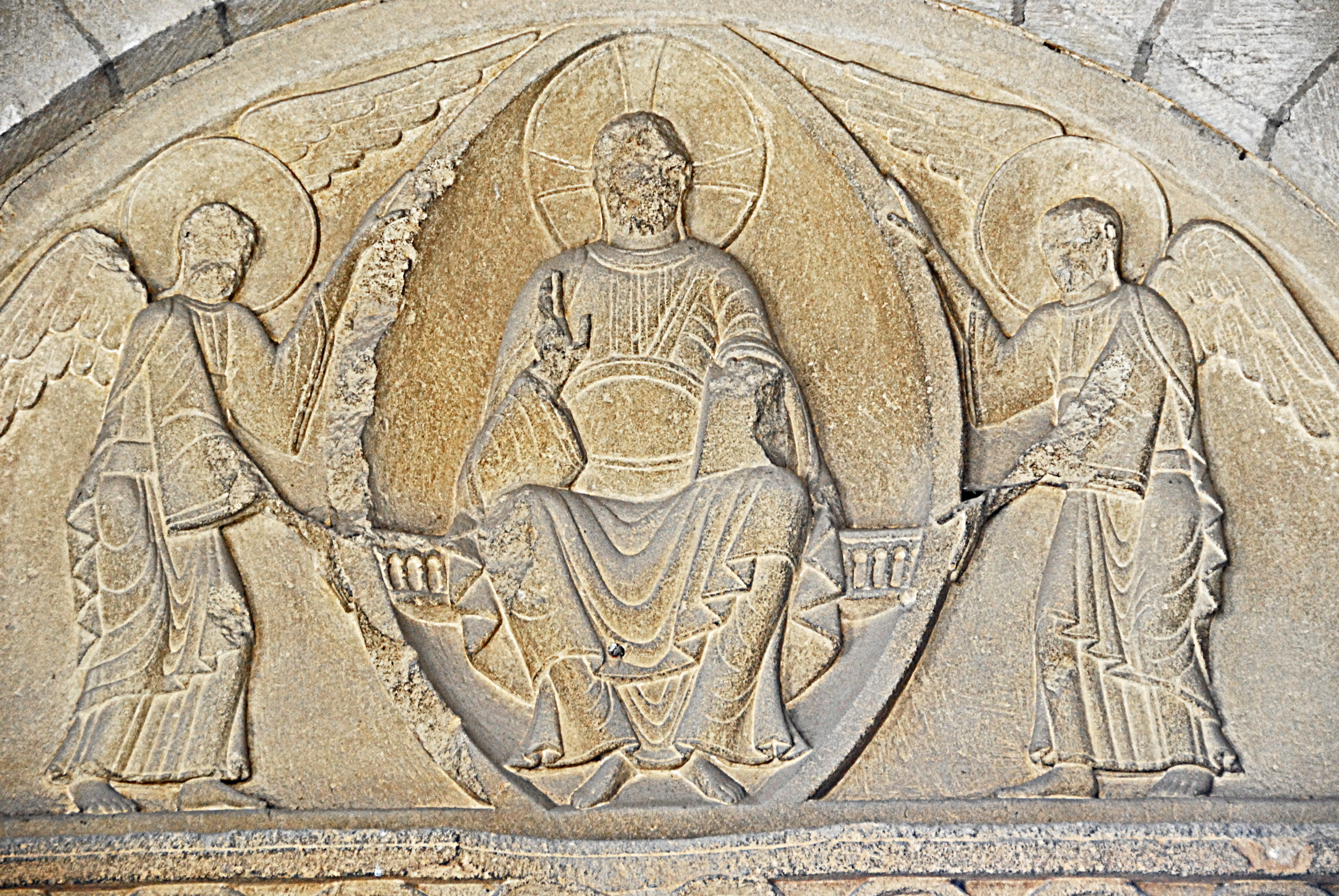 Westportal, Christus in der Mandorla